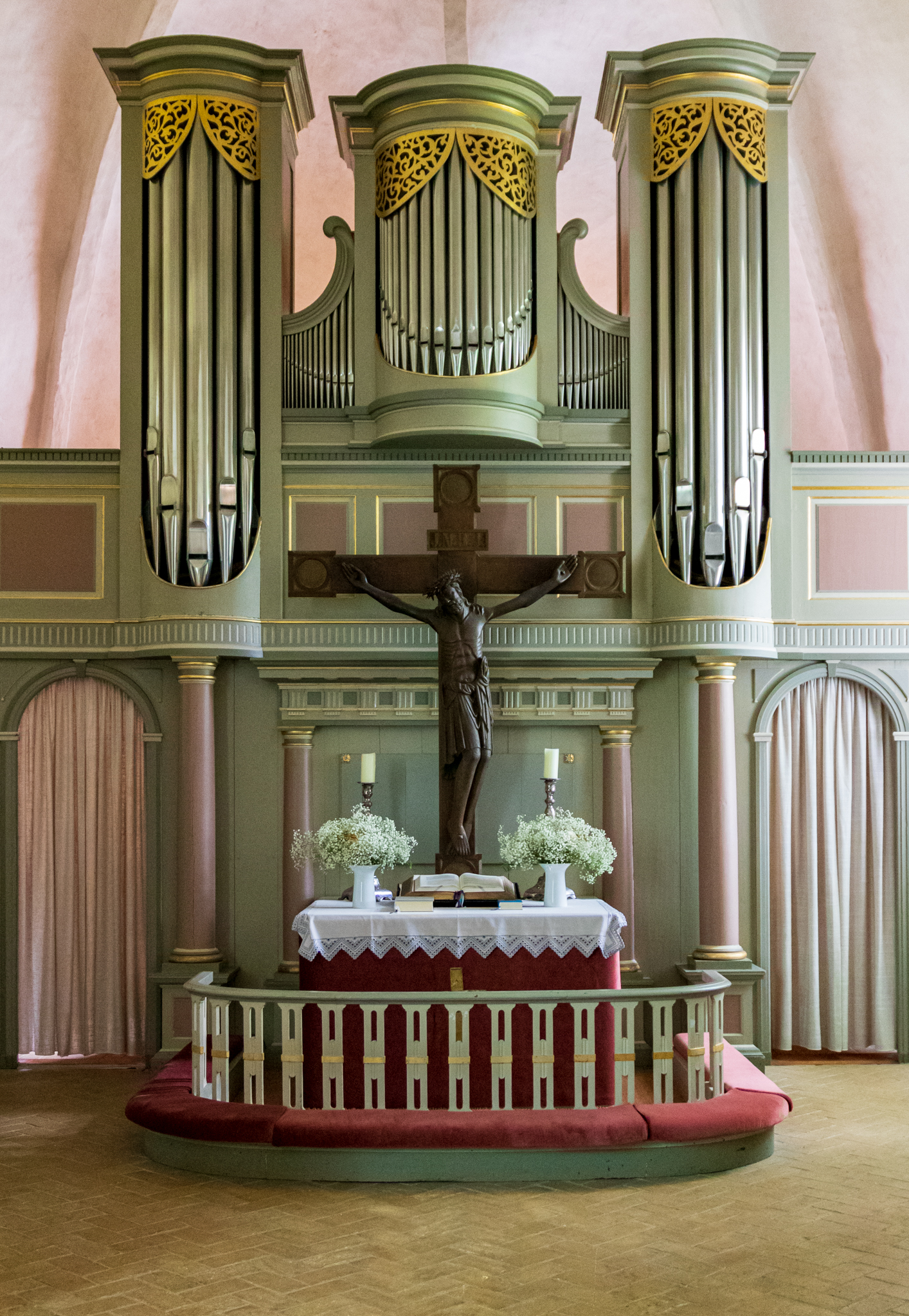 Prospekt der Marcussen-Orgel in der Kirche zu Sieseby